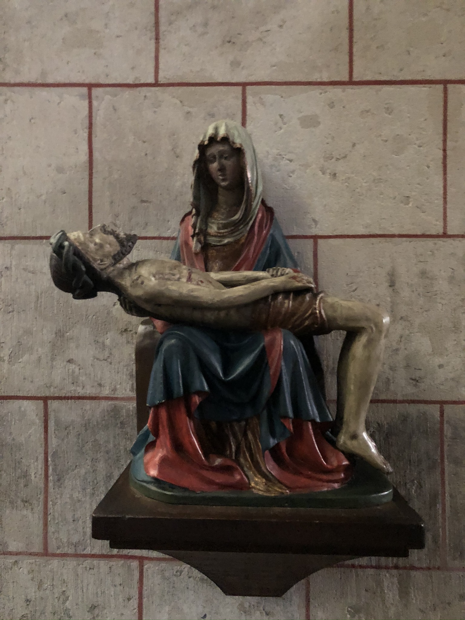 Vesperskulptur in St. Quirinus in Neuss, Rheinland